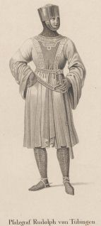 Pfalgraf Rudolf I. von Tübingen